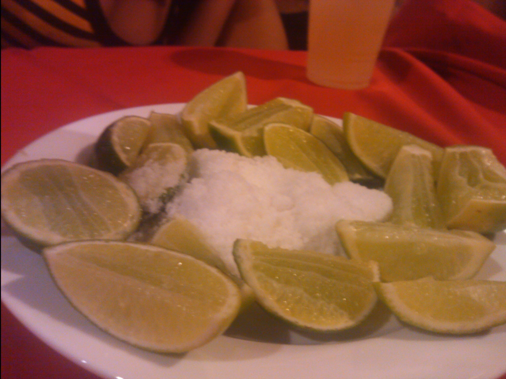 Limones con sal... Sirve para acompañar un trago de tequila. Foto tomada en la Isla de Margarita